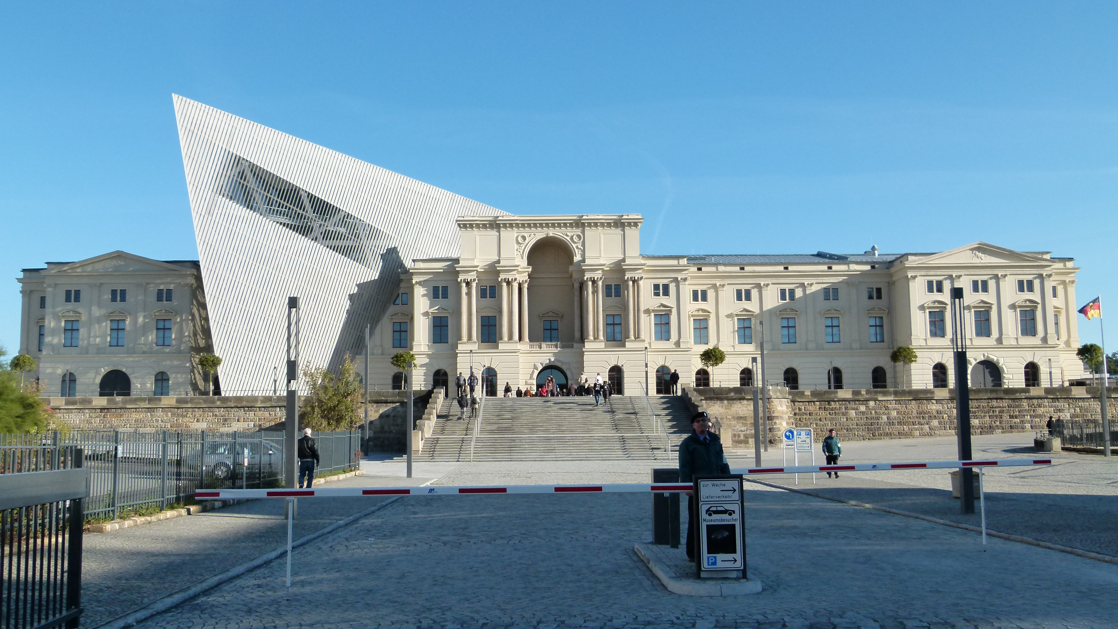 Außenansichten, Militärhistorisches Museum der Bundeswehr, Olbrichtplatz 2, Dresden